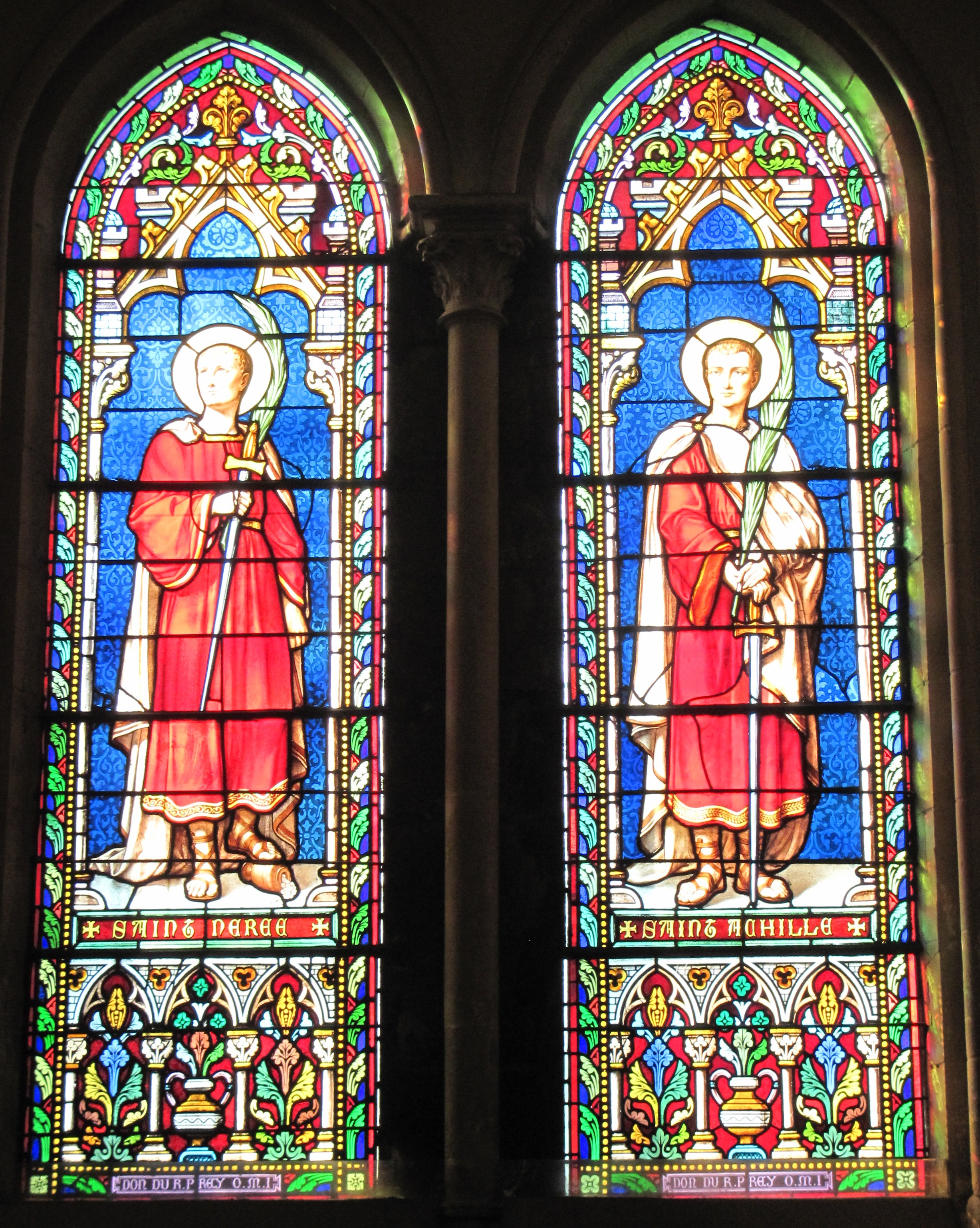 Nrf: Dans l'églyise dé Saint Thonmas, Saint Hélyi, Jèrri